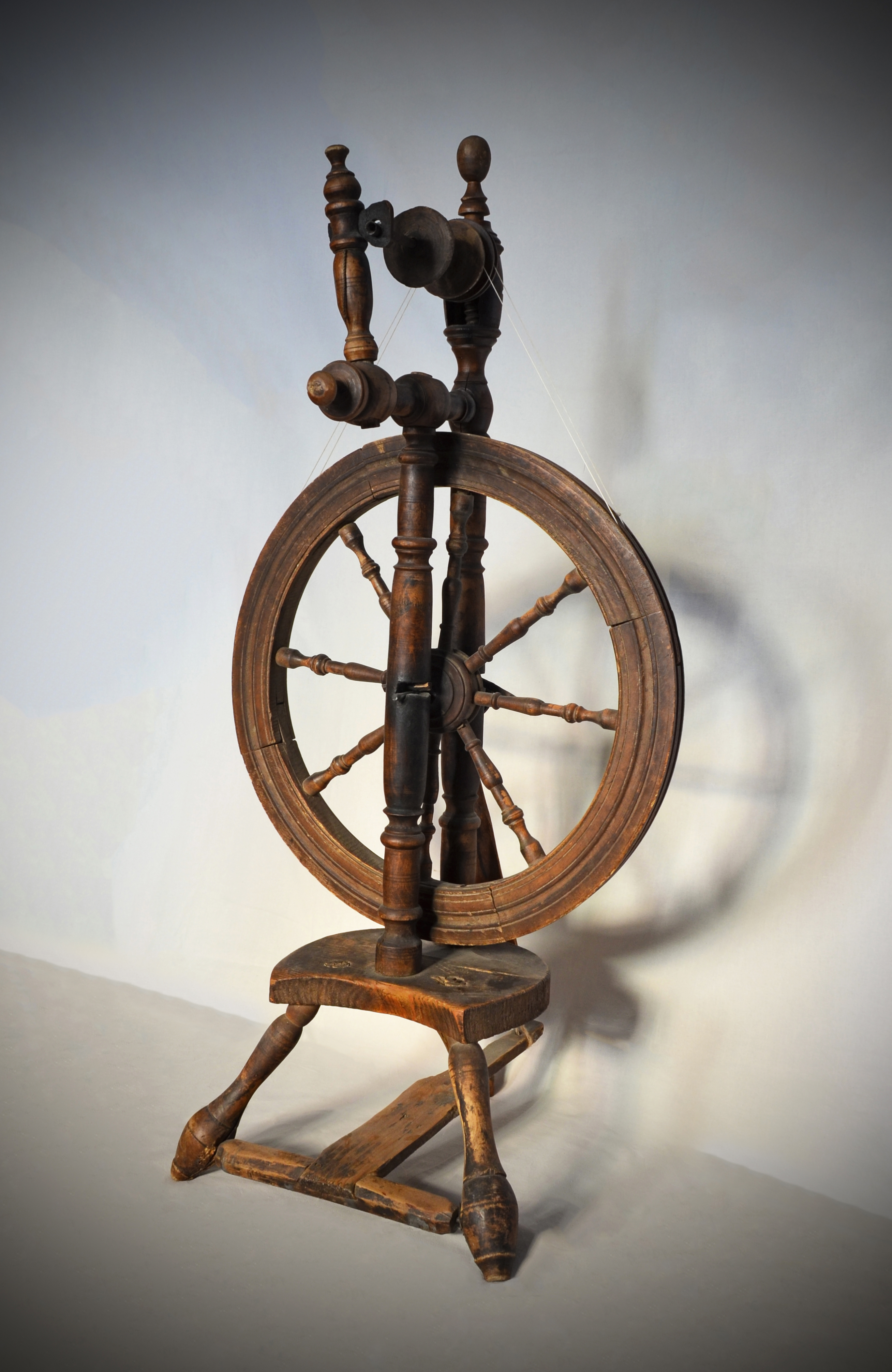 Русская самопрялка с вертикальным расположением колеса.